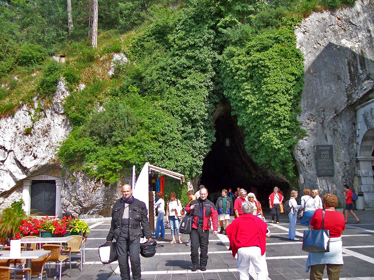 Exit of Postojnska Jama